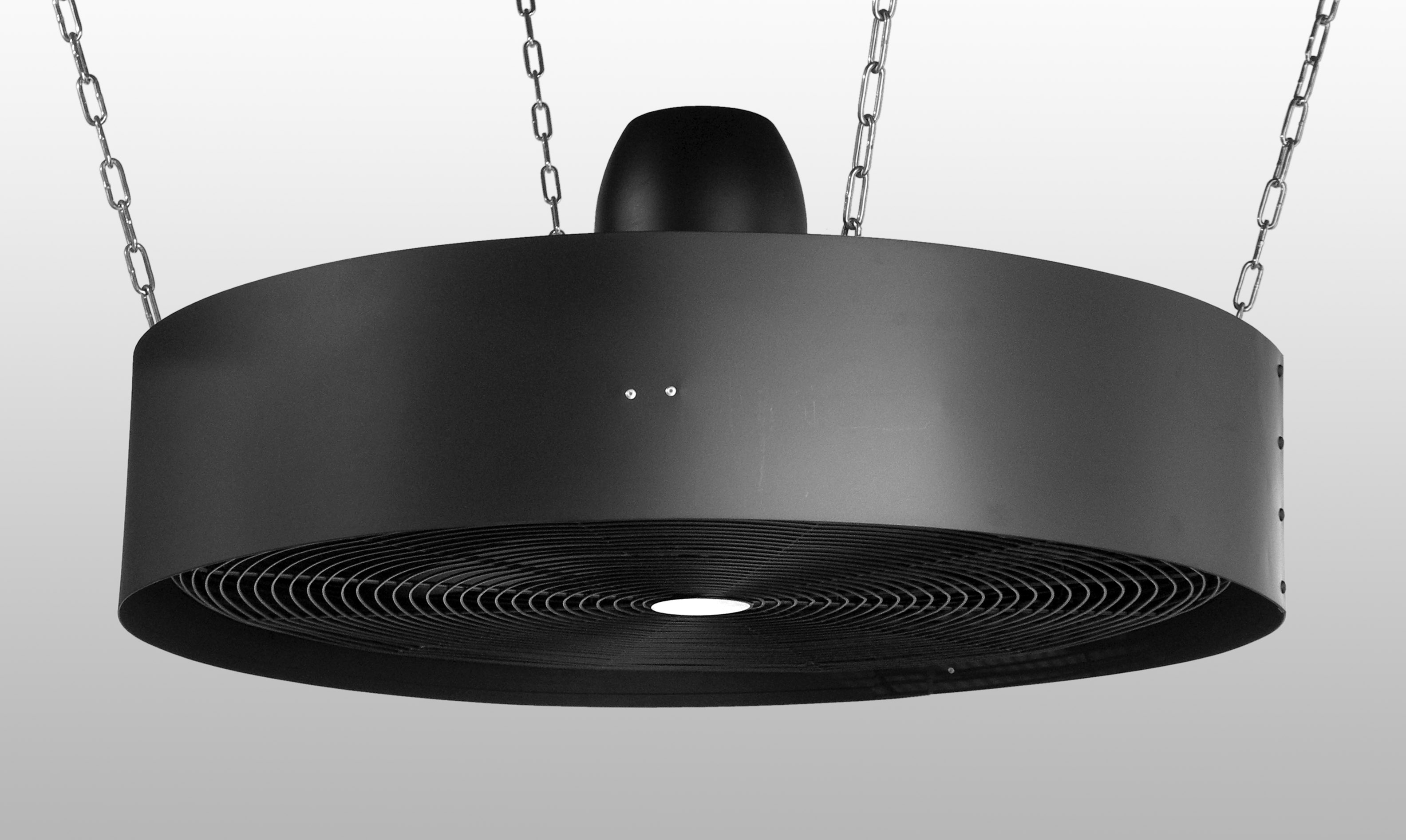 Industrie-Deckenventilator zur Warmluftrückführung in hohen Hallen